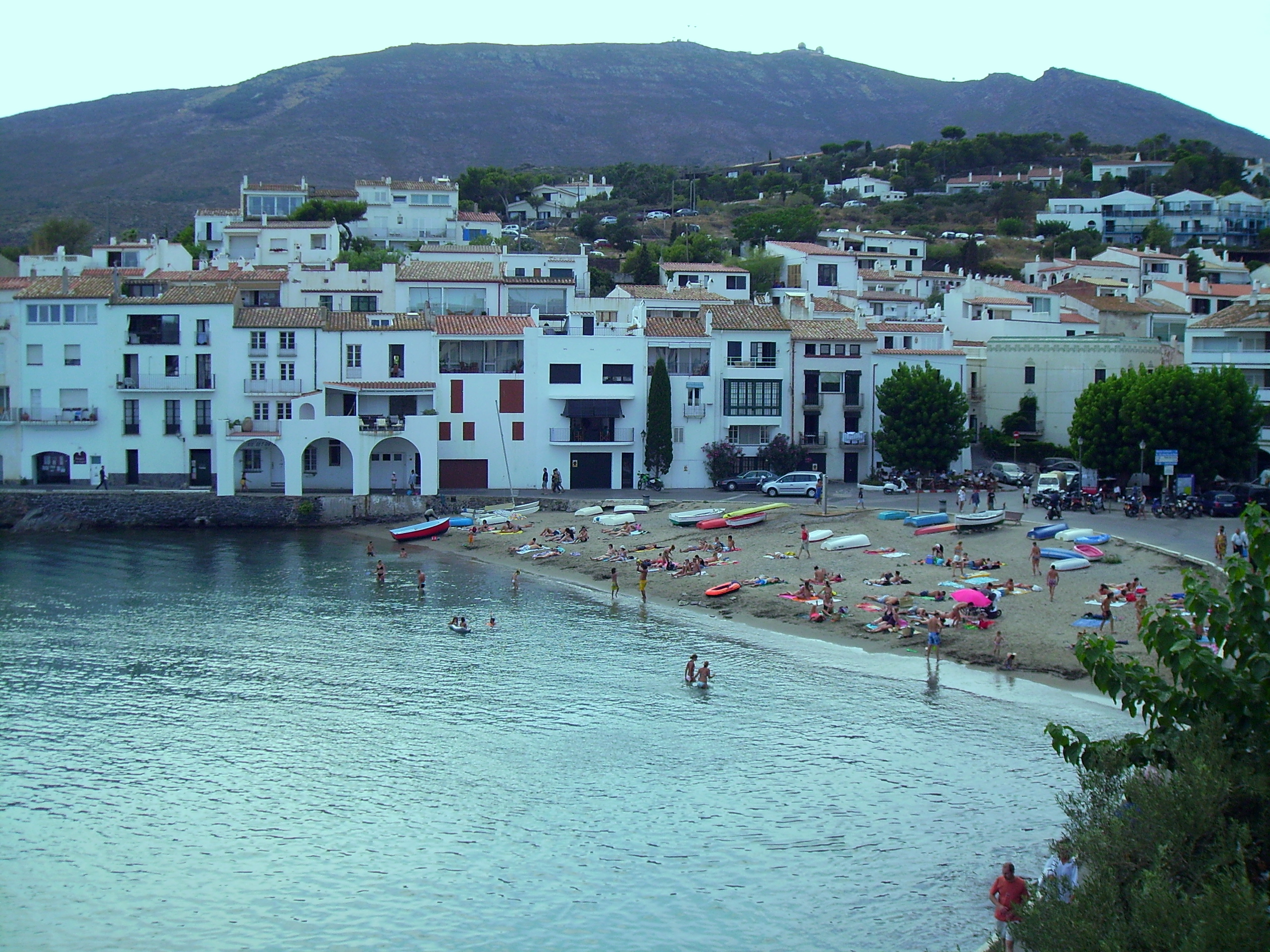 Es Port Dogué, a l'esquerra la Riba Pitxot, Cadaqués